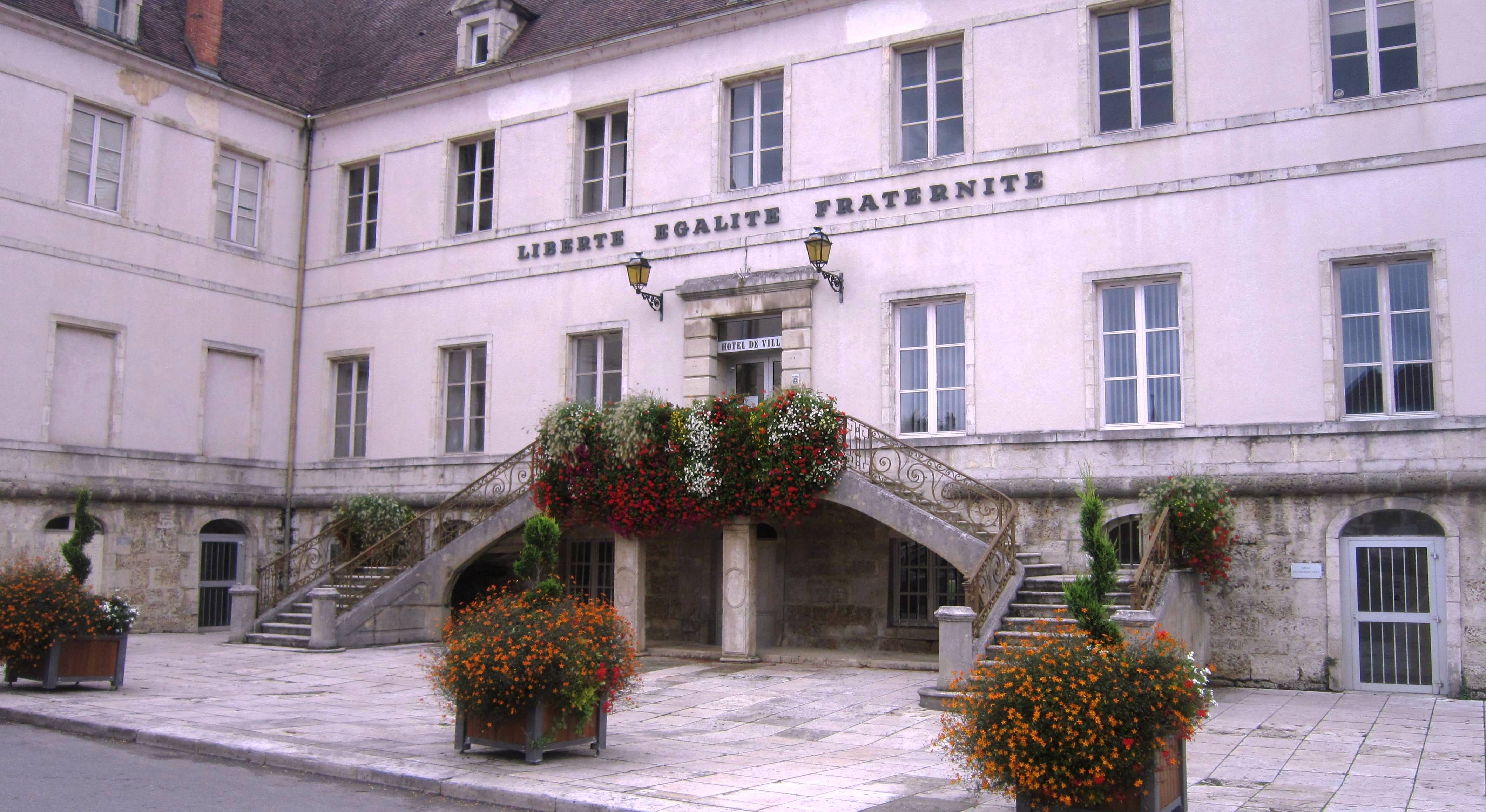 La mairie de Châtillon-sur-Seine